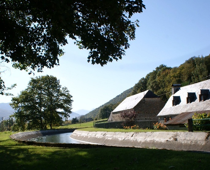 Het kanaal van de Neste bij Tachoures.